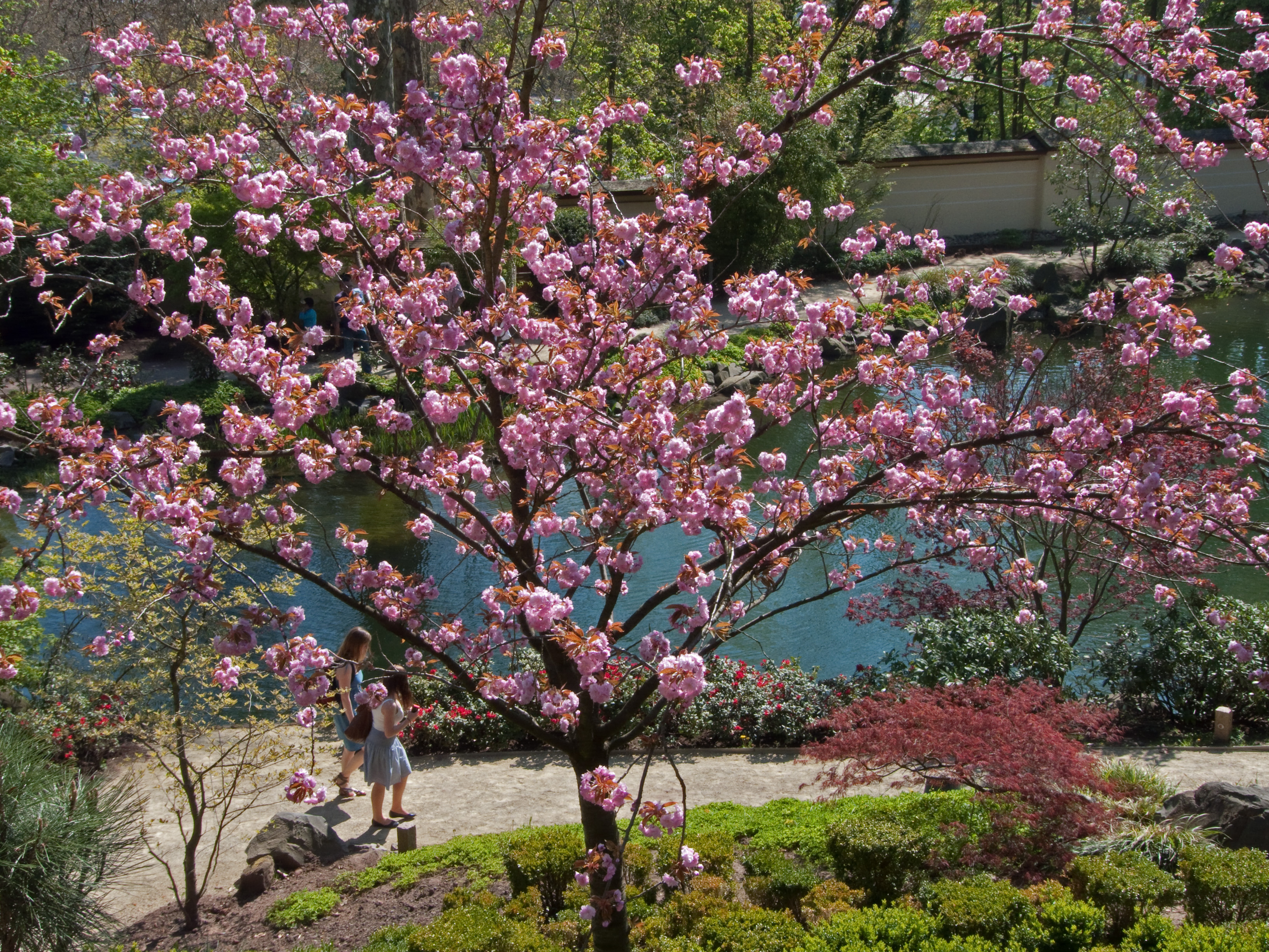 Dieser Baum steht im Japanischen Garten von Kaiserslautern